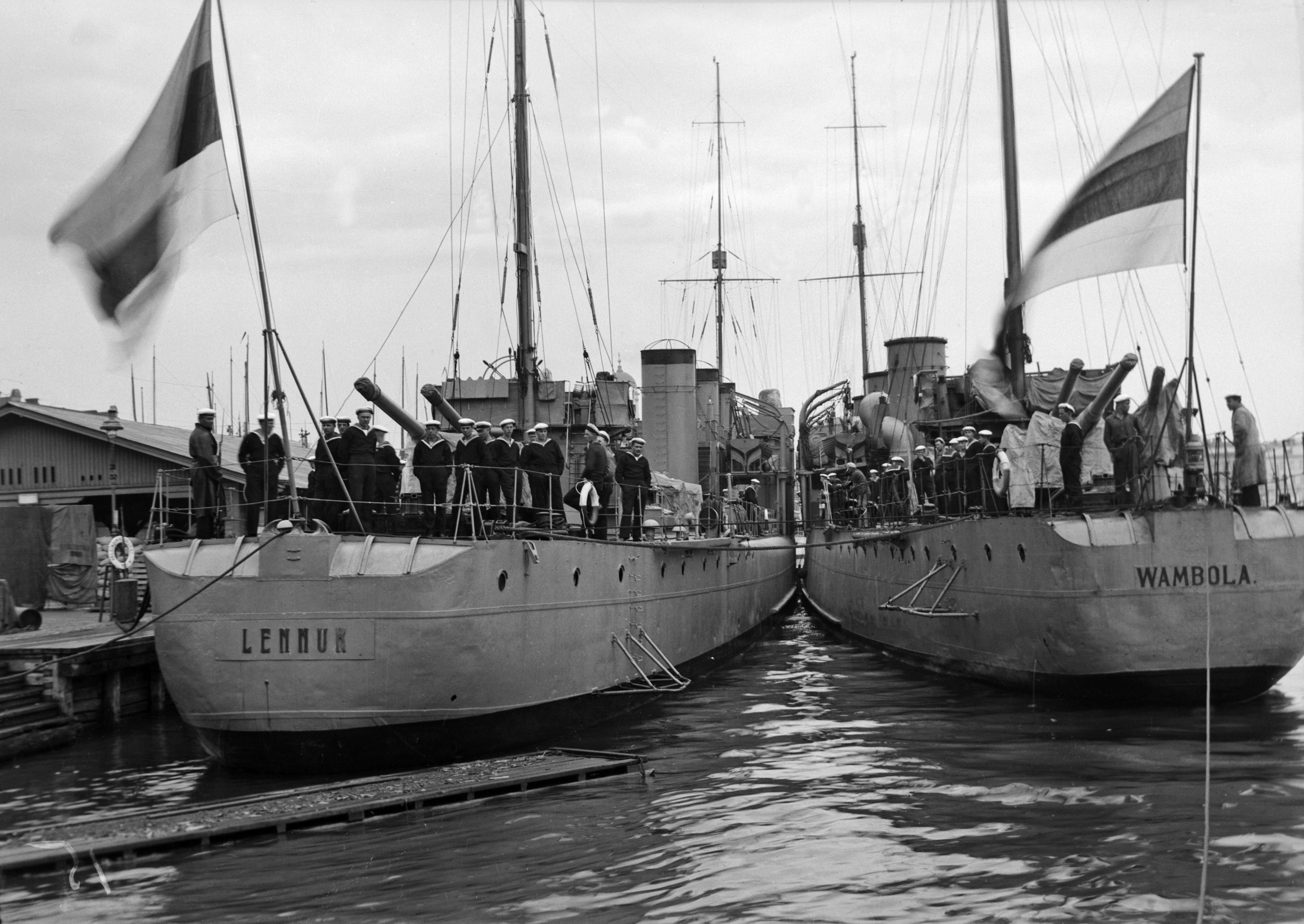 Virolaiset sotalaivat Lennuk ja Wambola Eteläsatamassa. Alukset toivat Viron kävijäin muistopatsaan paljastustilaisuuteen Viron hallituksen edustajat ja joukko-osastot. -- negatiivi, nitraatti, mv